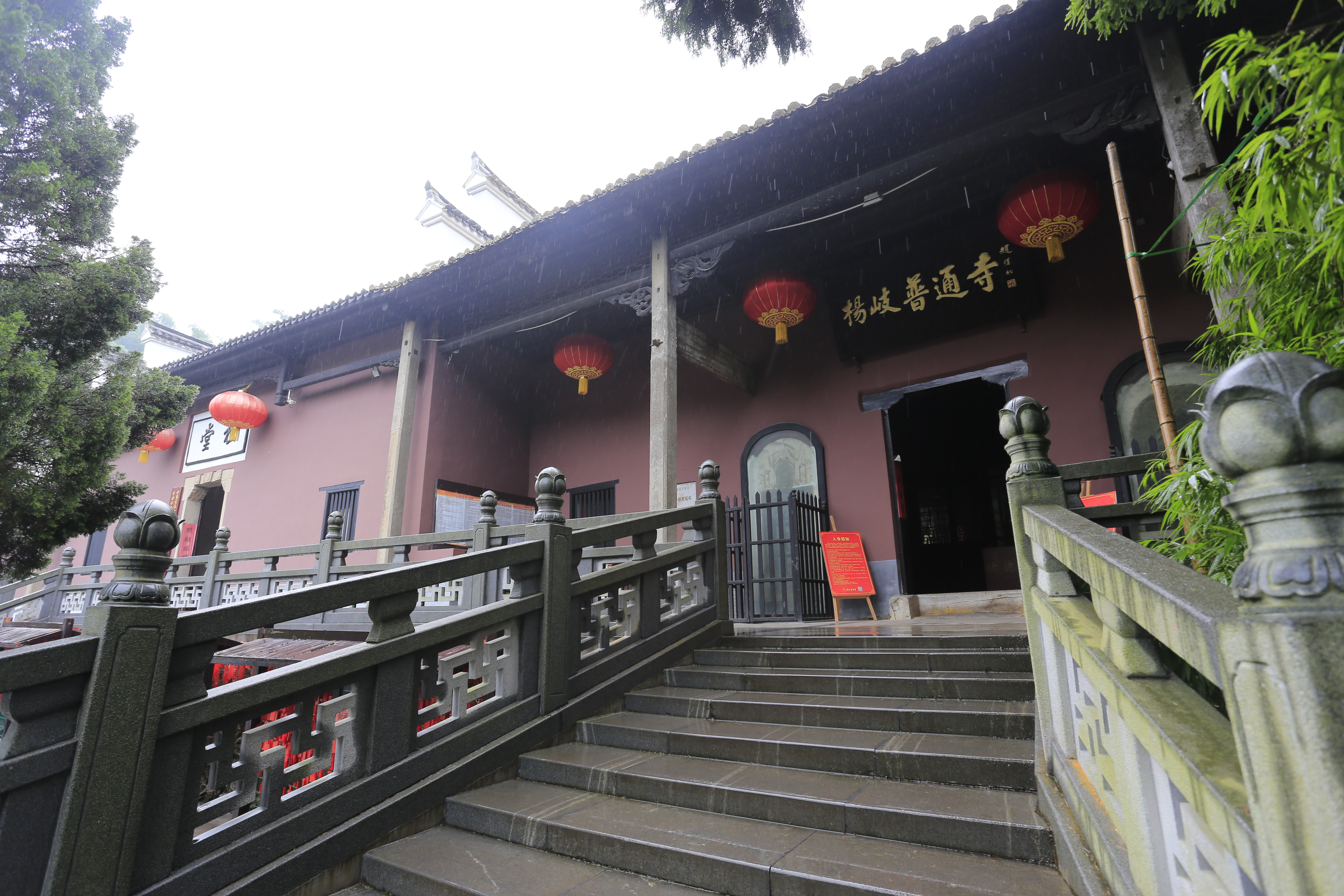 萍乡杨岐山 普通寺前殿